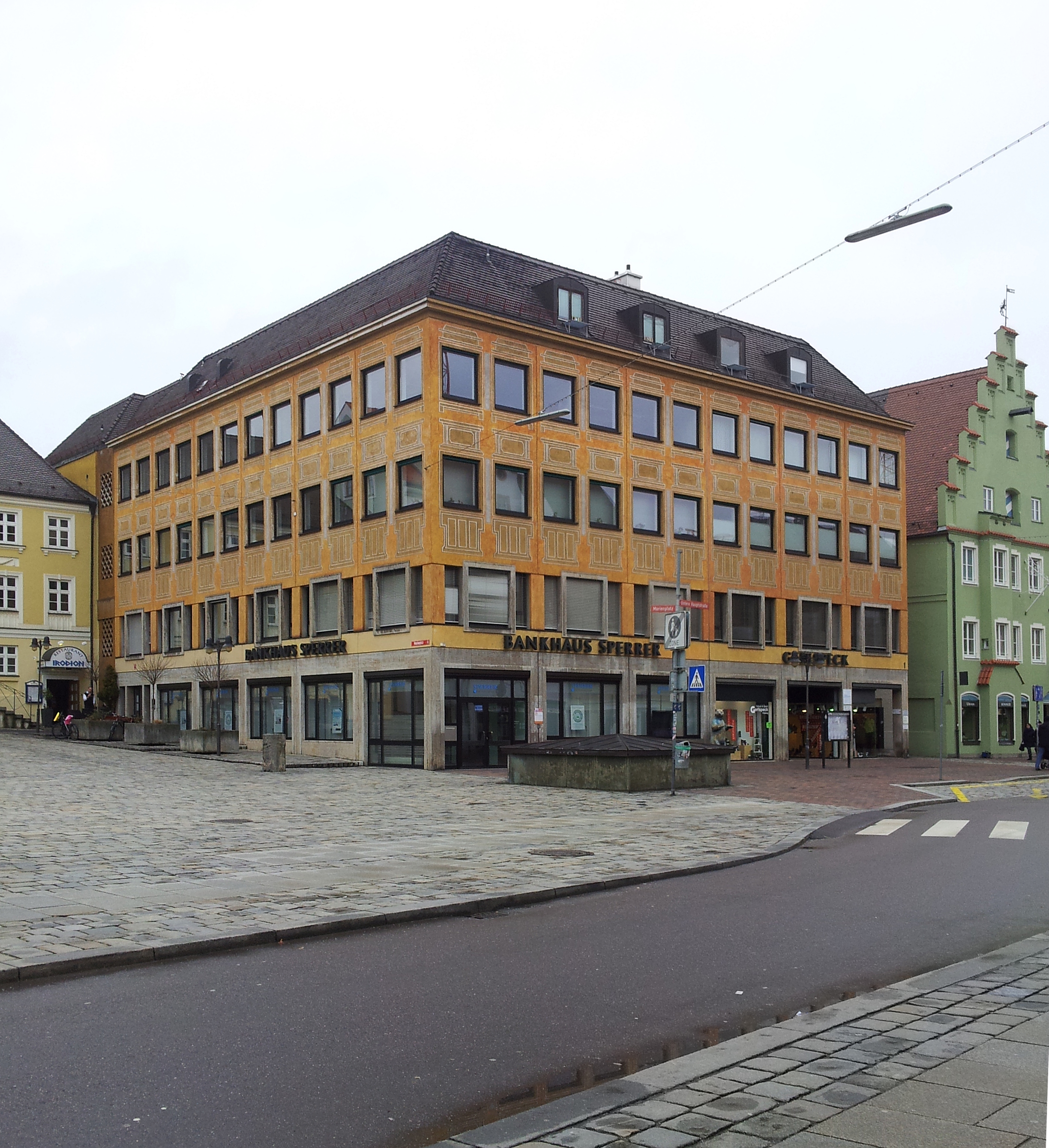 Marienplatz 5 in Freising; Sitz des Bankhauses Sperrer